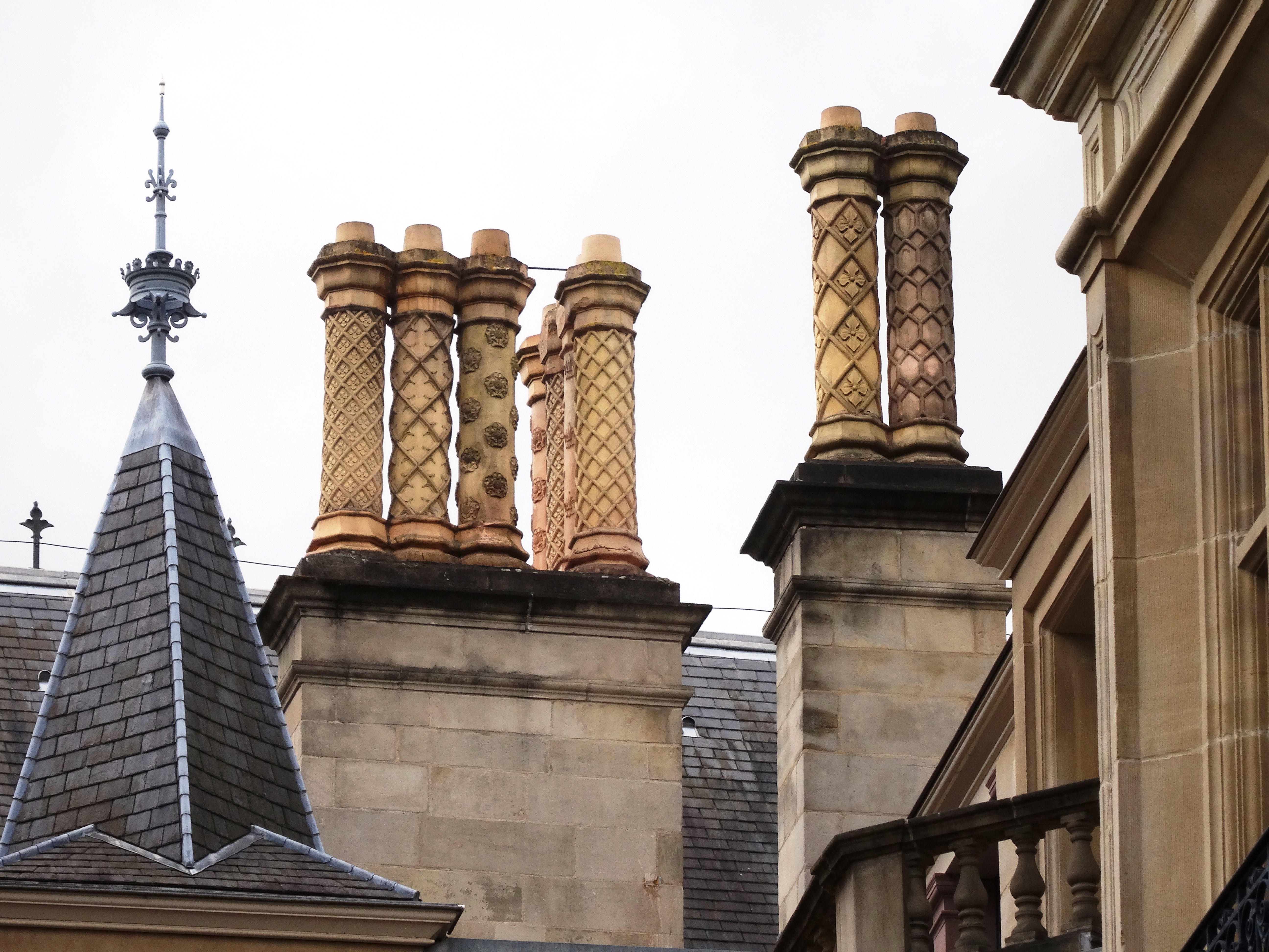 Großherzogliches Papalais in Luxemburg: Dachlandschaft mit reich verzierten Schornsteinen